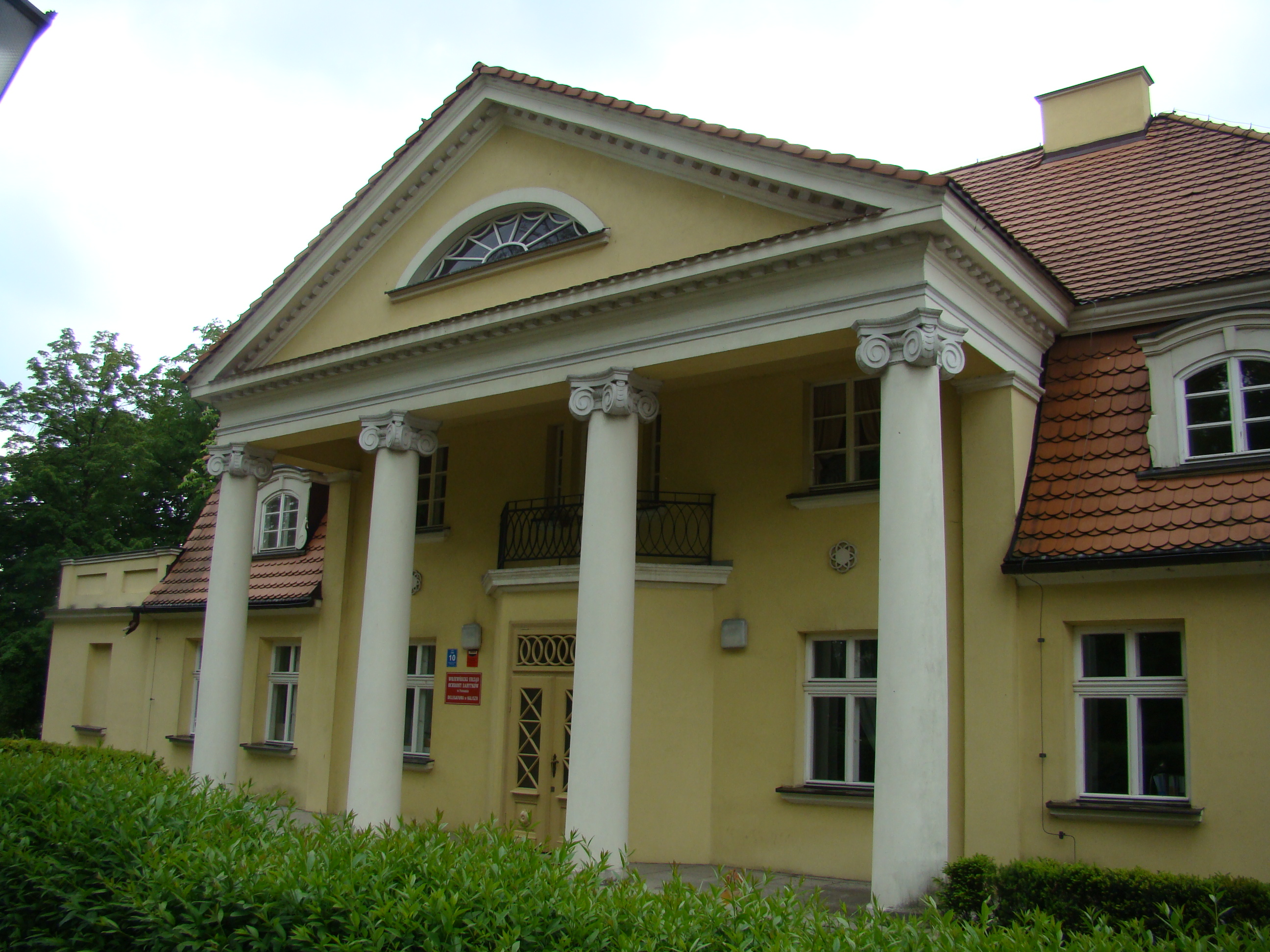 MAJKÓW 02